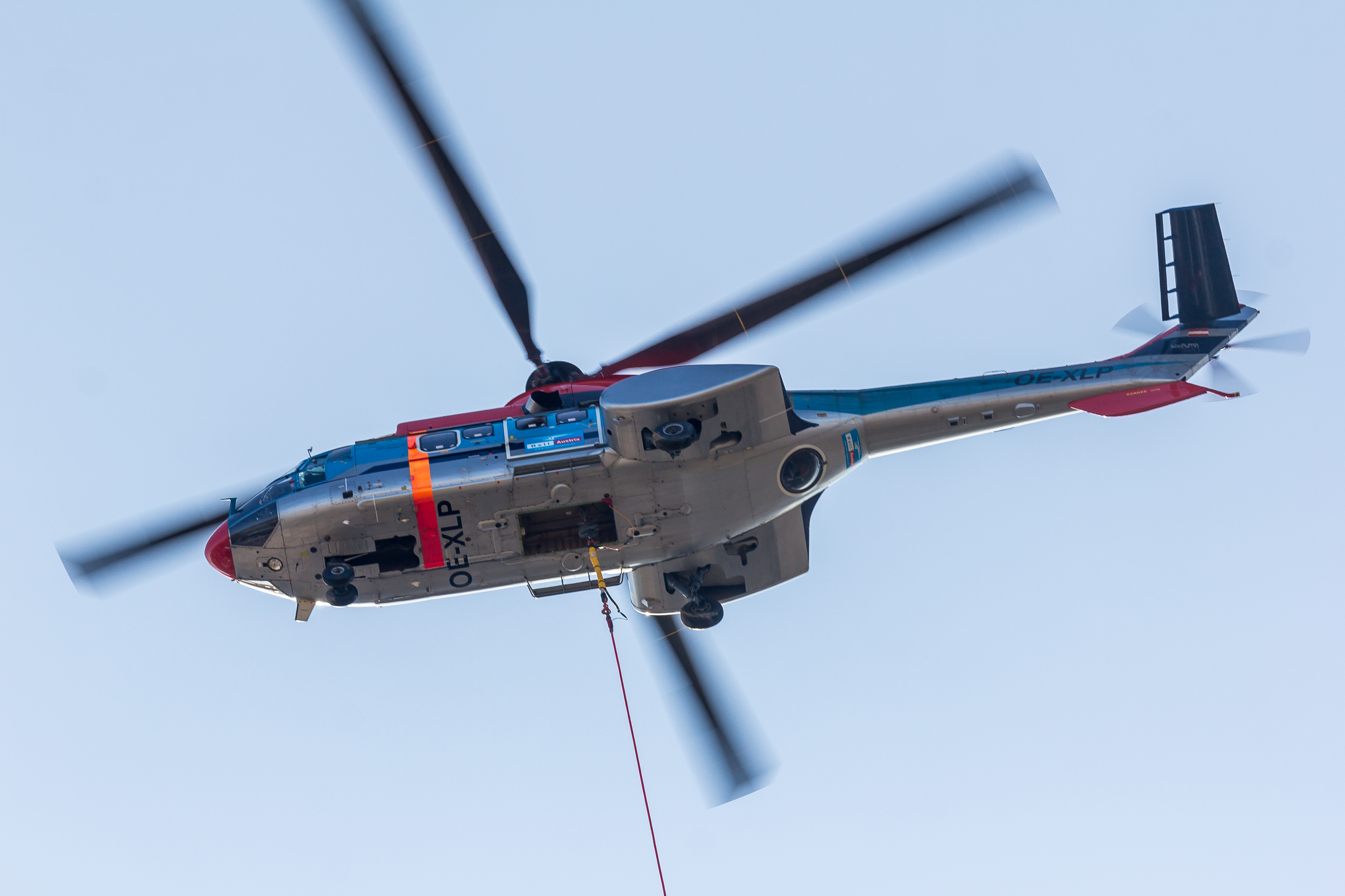 Montageflug von Klimatechnik mit einem Helikopter (Eurocopter AS332 L1 Super Puma der Heli Austria, Registrierung OE-LXP) am KölnTurm Februar 2018. Zuerst wurde alte Klimatechnik zum Boden abgelassen, danach neue Klimatechnik auf das Dach des KölnTurms hochgehoben.